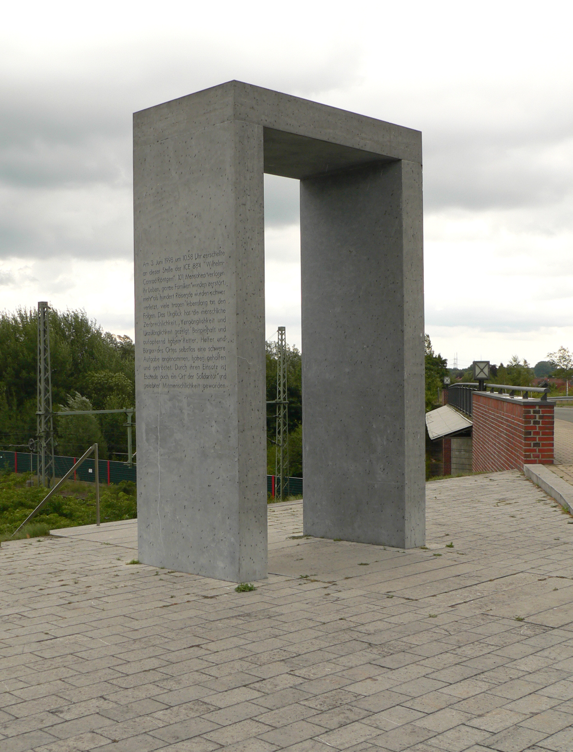 Gedenkstätte Eschede